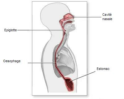 Position de l'oesophage dans le corps humain.